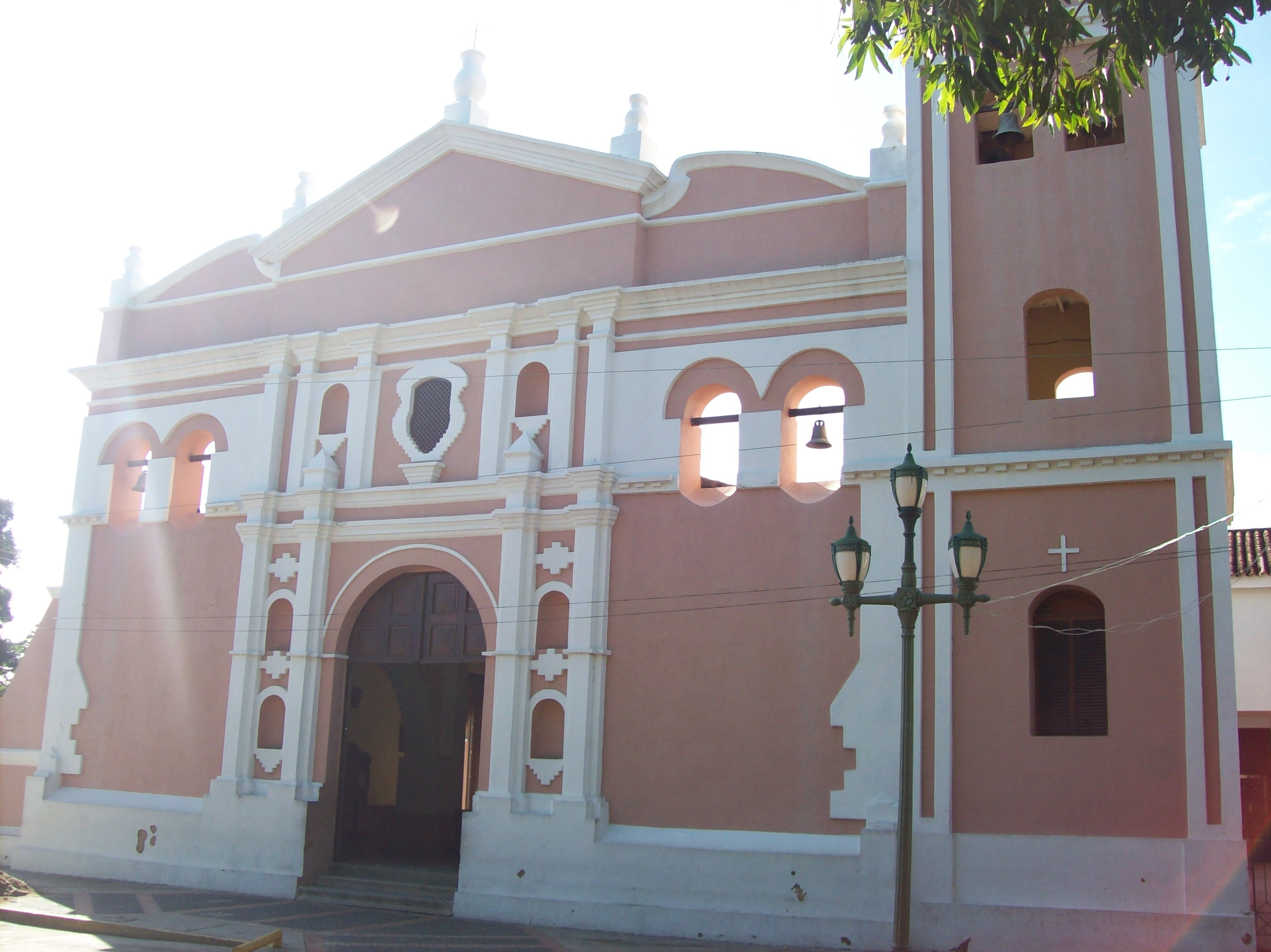 Catedral Nuestra Señora del Pilar de Santiago y Zaragoza en Barinas, Venezuela